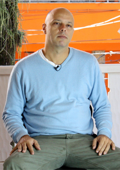 O diretor de cinema José Padilha.